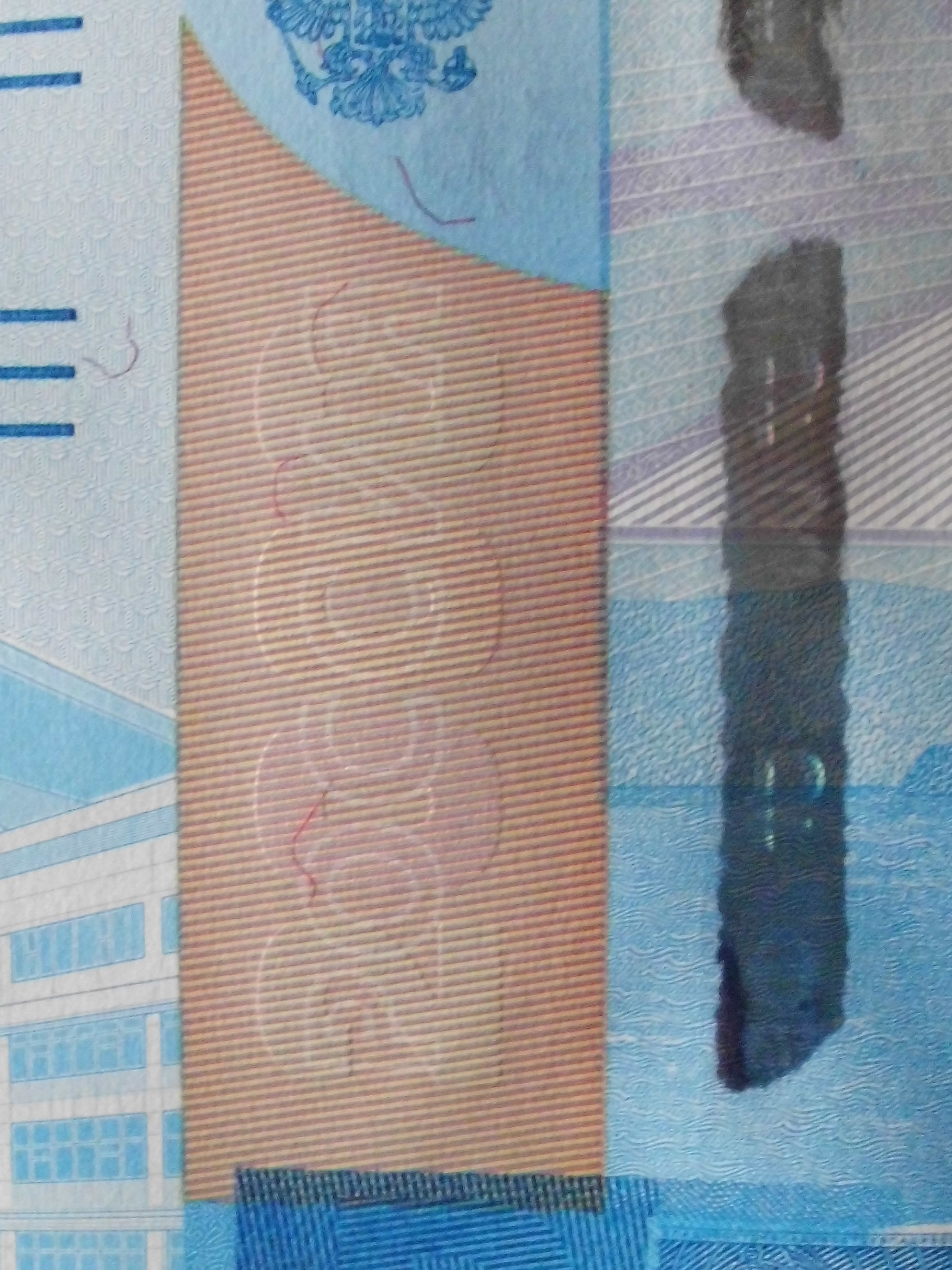 2000 российских рублей образца 2017 года. Аверс. Цветопеременное число 2000, контурная надпись "РОССИЯ" на заштрихованном флюоресцирующем поле с левой стороны банкноты. Вид под прямым углом.